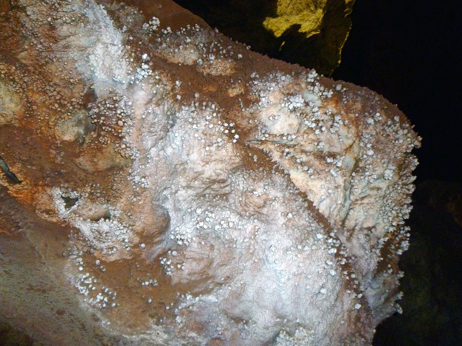 Kubacher Kristallhöhle